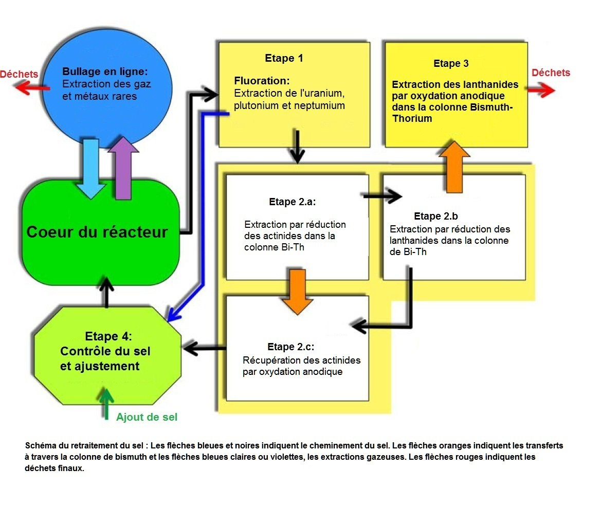 Schéma du retraitement en ligne des sels d'un MSFR